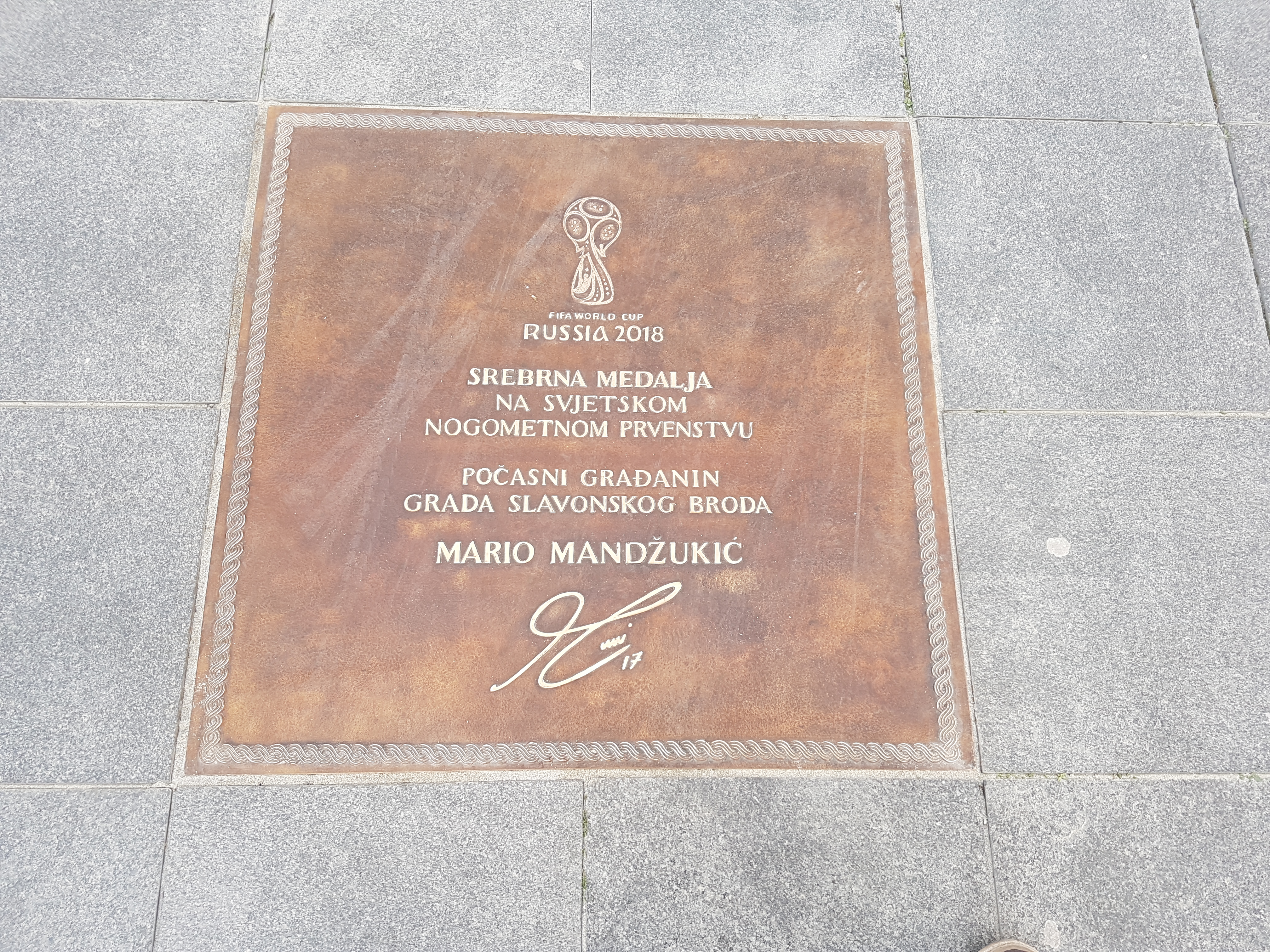 Ploča posvećena Mariju Mandžukiću